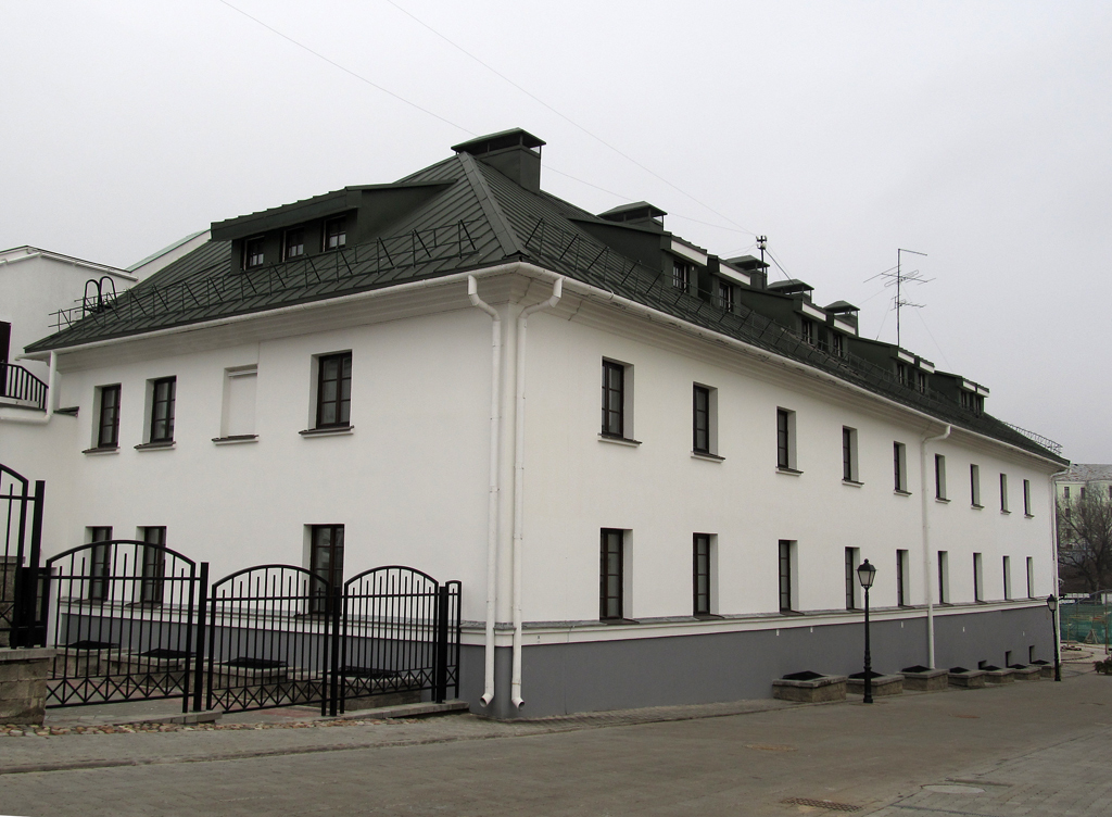 Мінск. Вуліца Кірыла і Мяфодзія, 7 / вуліца Зыбіцкая, 25